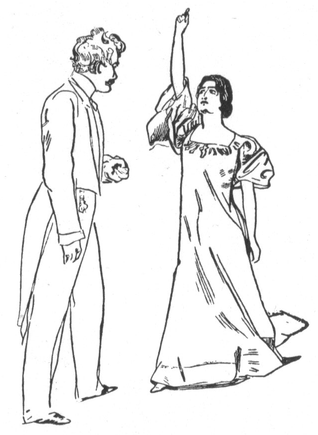 Fra oppsetningen av Gunnar Heibergs "Det store lod" på Carl Johan-teatret. Fra venstre: Severin Roald som Haller og Johanne Voss som Ilka. Tegning av Christian Krohg.